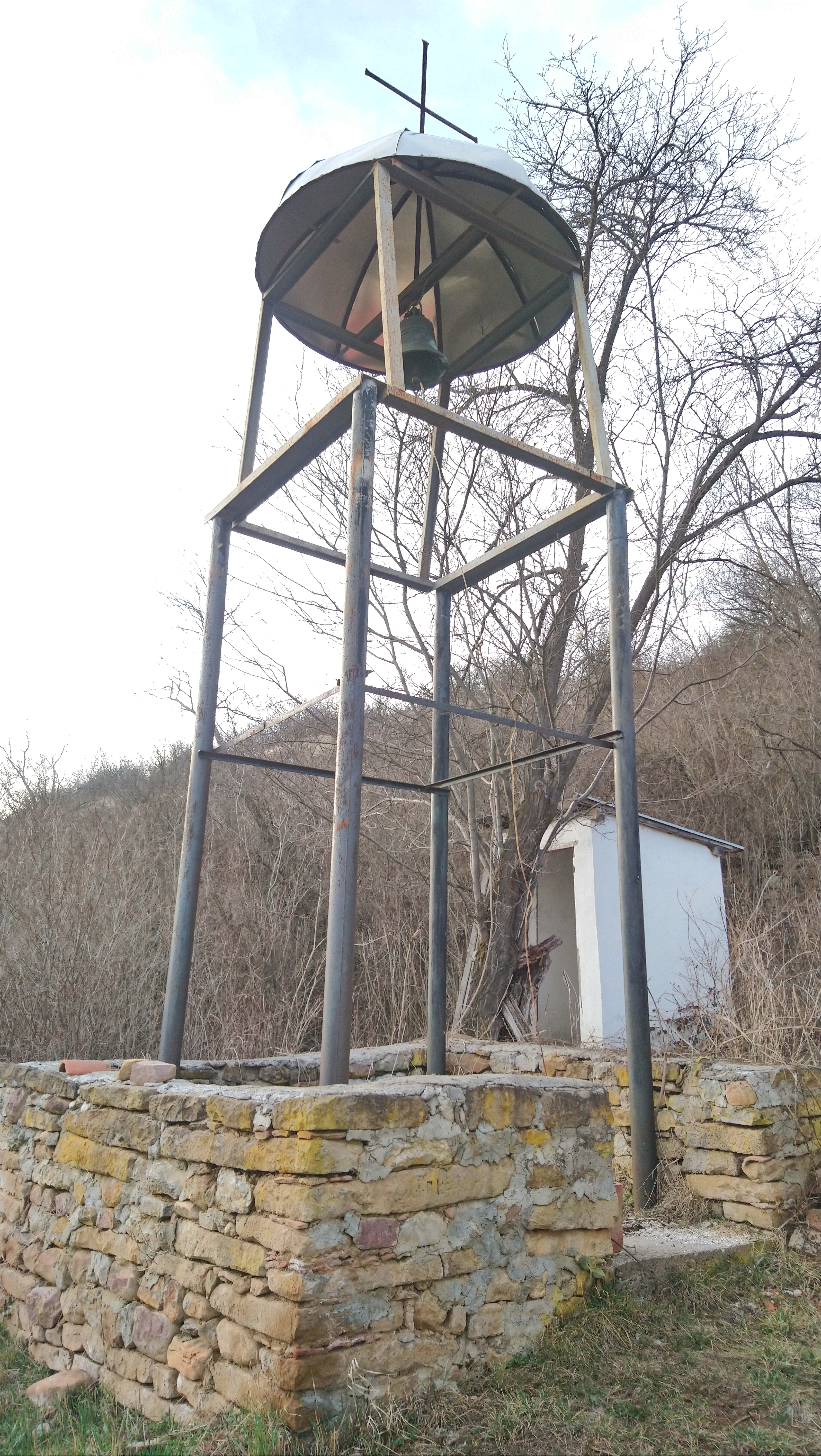 Камбанарията към църква Св Николай Чудотворец в село Туден, Община Годеч